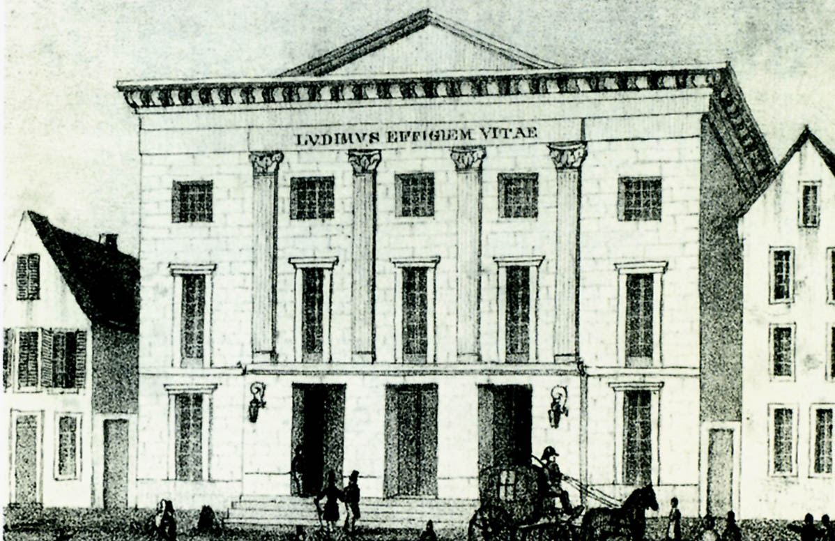 Köln, Theater Schmierstraße um 1869, im gleichen Jahr abgebrannt.